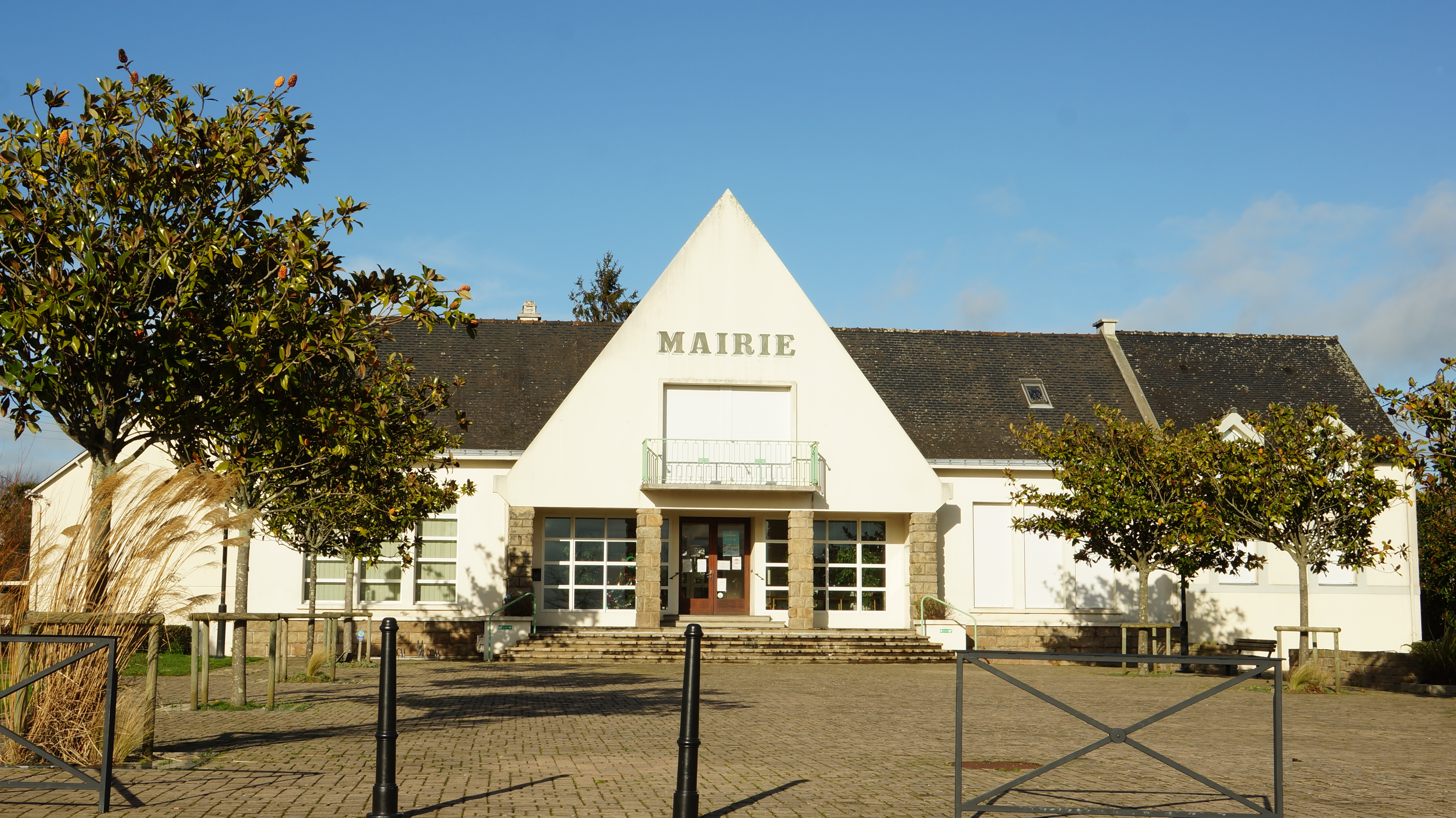 La mairie d'Allaire (vue face avant)